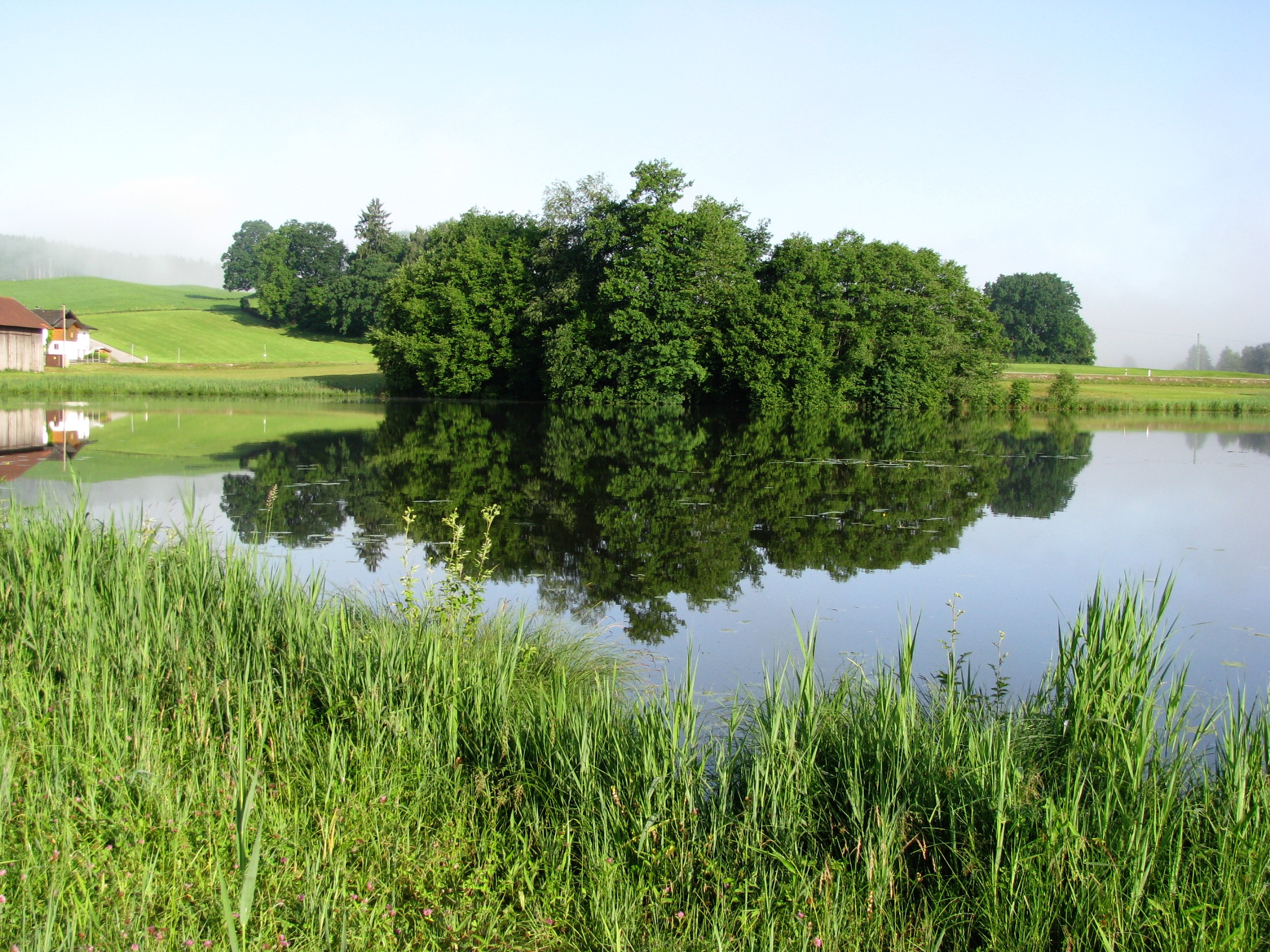 Riederner Weiher, südlicher Teil nach Westen